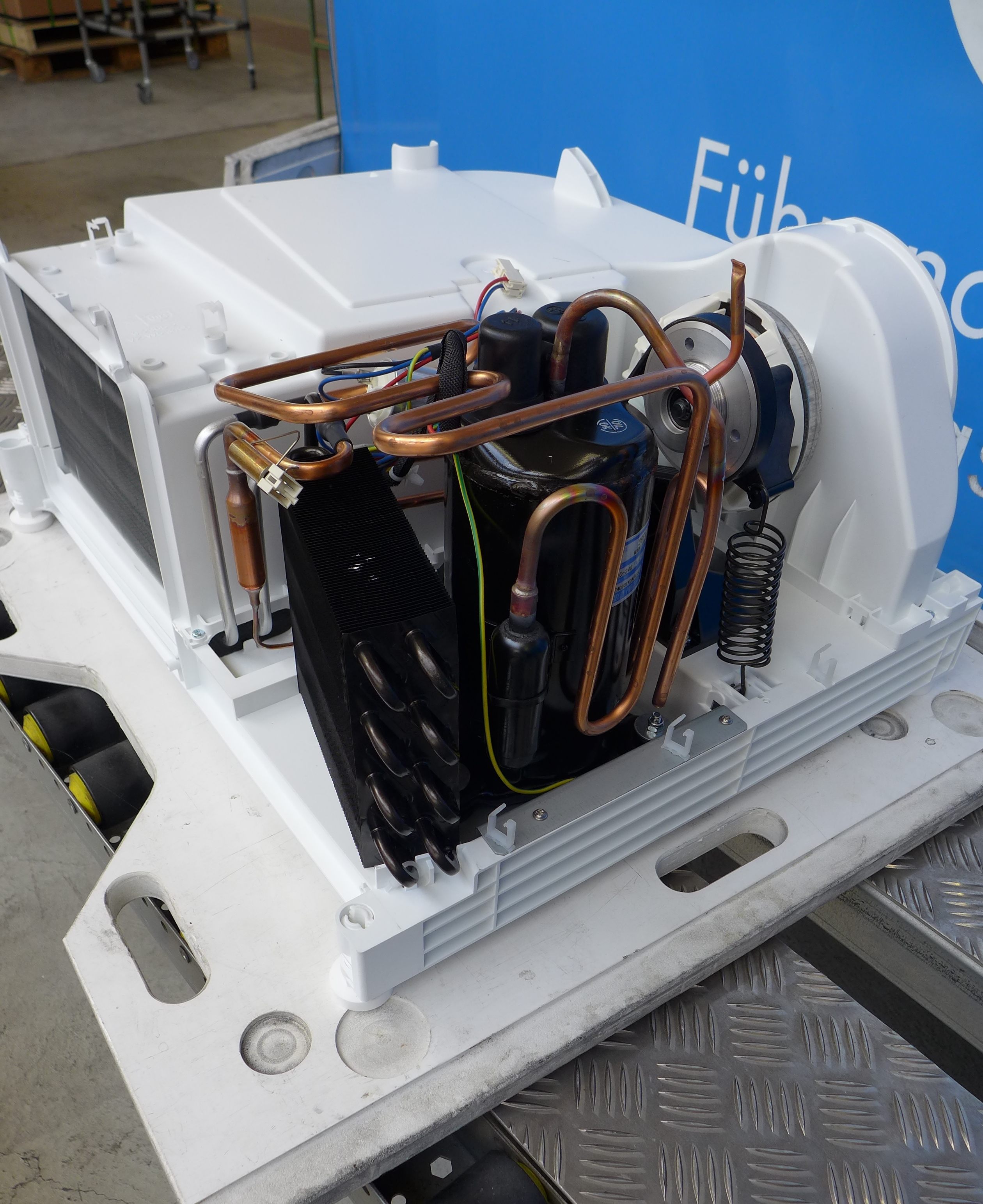 Wärmepumpenaggregat eines Wäschetrockners